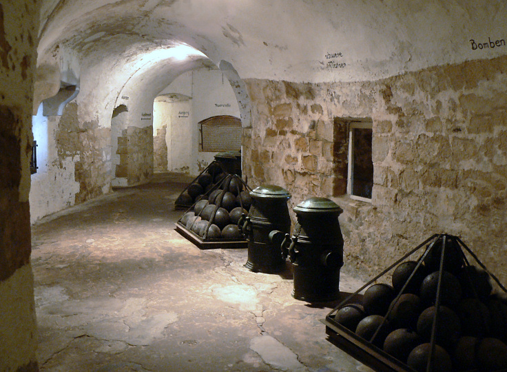 Kasematte in der Festung Wilhelmstein